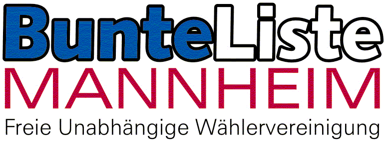 Logo der Bunten Liste Mannheim (BLM) - Vorgänger der BürgerUnion Mannheim